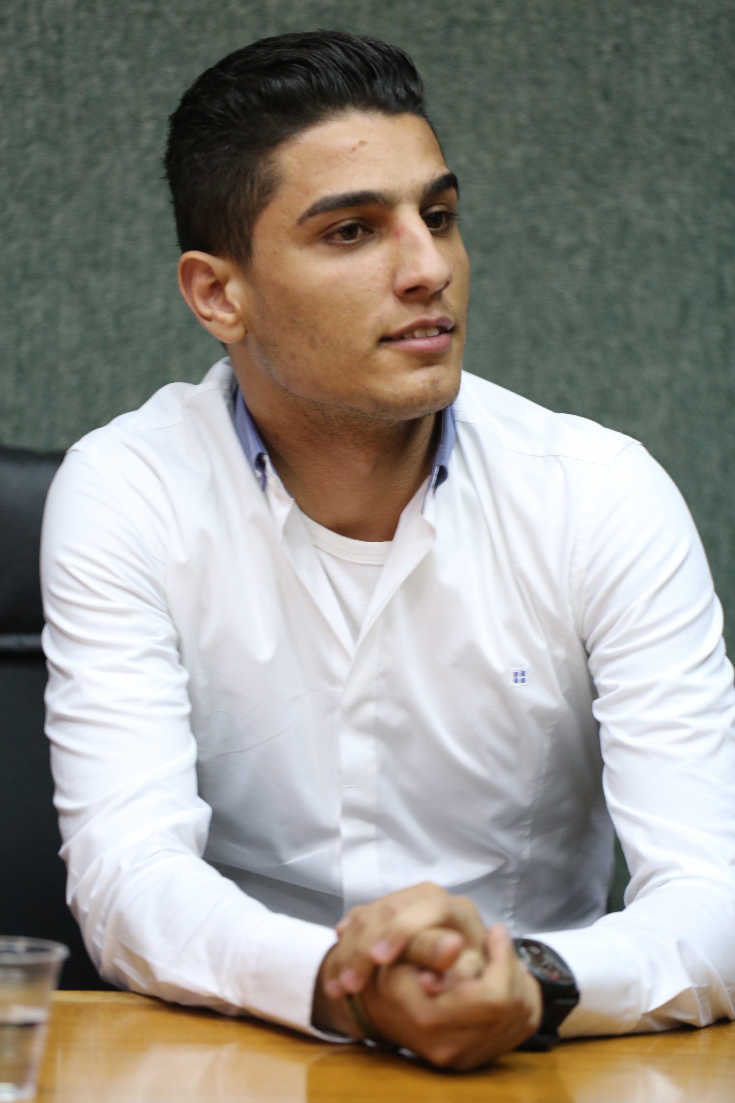 הזמר מוחמד עסאף בעירית נצרת